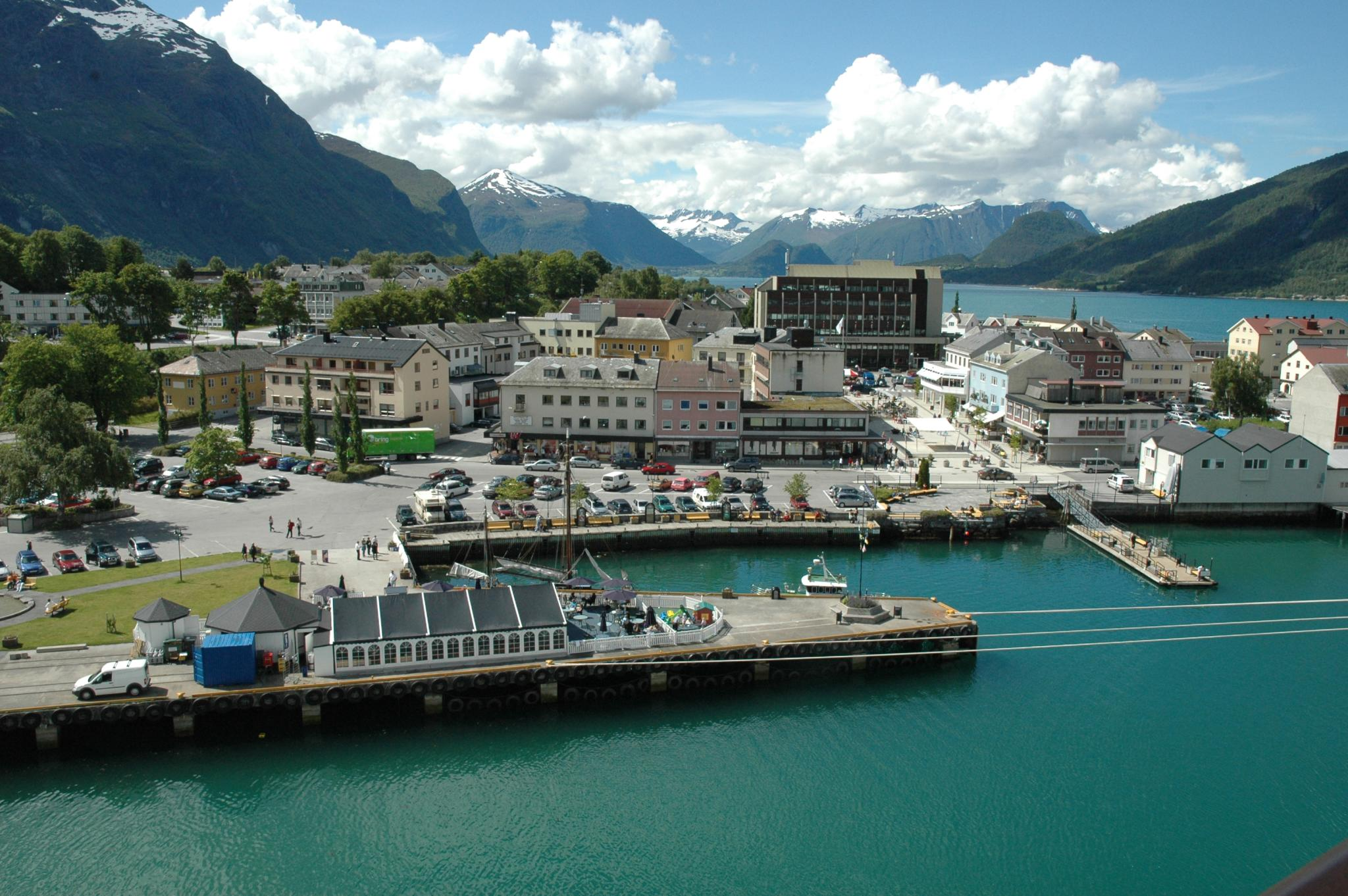 Hafen von Andalsnes